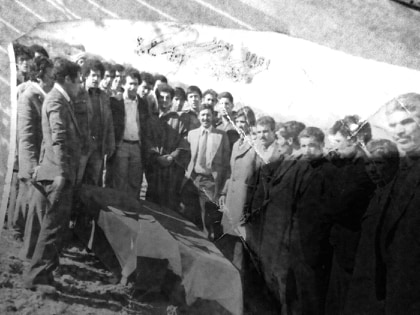 العثور على رفات الشهيدين قرابصي و بومنجل